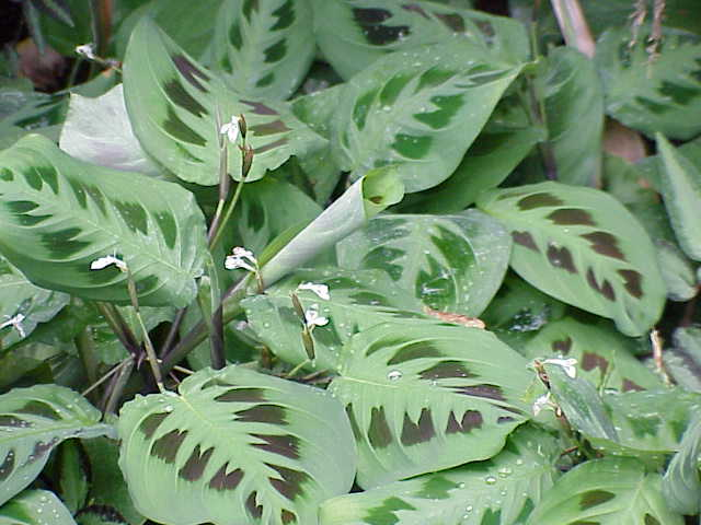 Species: Maranta leuconeura Family: Marantaceae Image No. 4